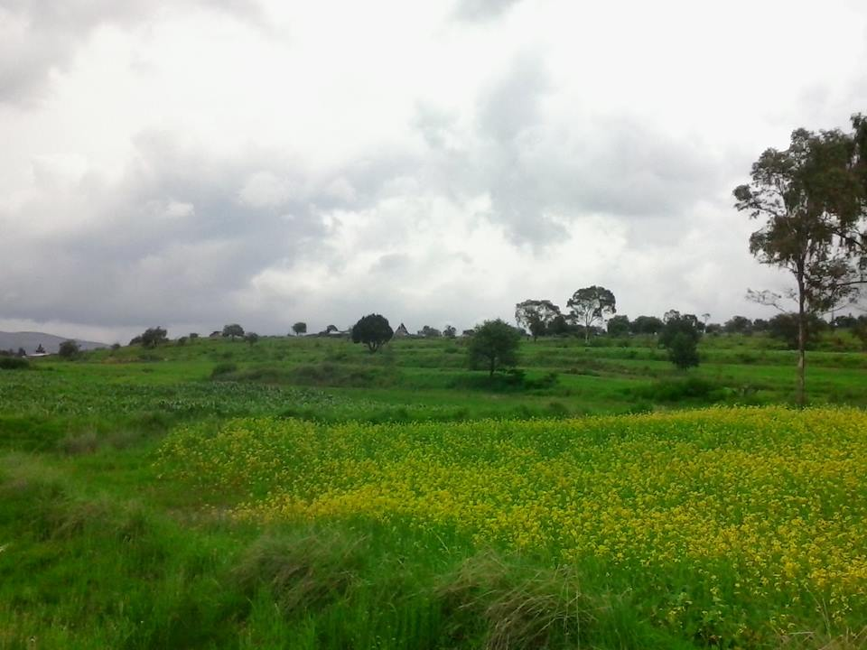 En verano, es cuando comienzan a caer las primeras lluvias del año, por lo cual los agricultores comienzan a sembrar. Gracias a esto nos regalan estas bellas imagenes